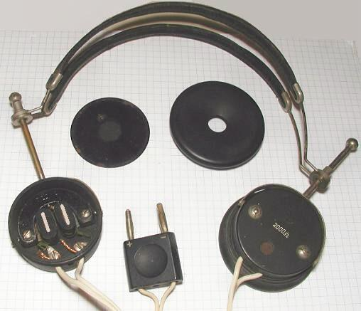 magnetischer Kopfhörer aus der Zeit der Detektorempfänger, links die geöffnete Kapsel mit den beiden Polen und den darum angebrachten Spulen des Magentsystems, Mitte links die Eisenblechmembran der geöffneten Kapsel; sie liegt im montierten Zustand in geringem Abstand zu den Magnetpolen. Der Kopfhörer hat die damals übliche Impedanz von 2 kOhm